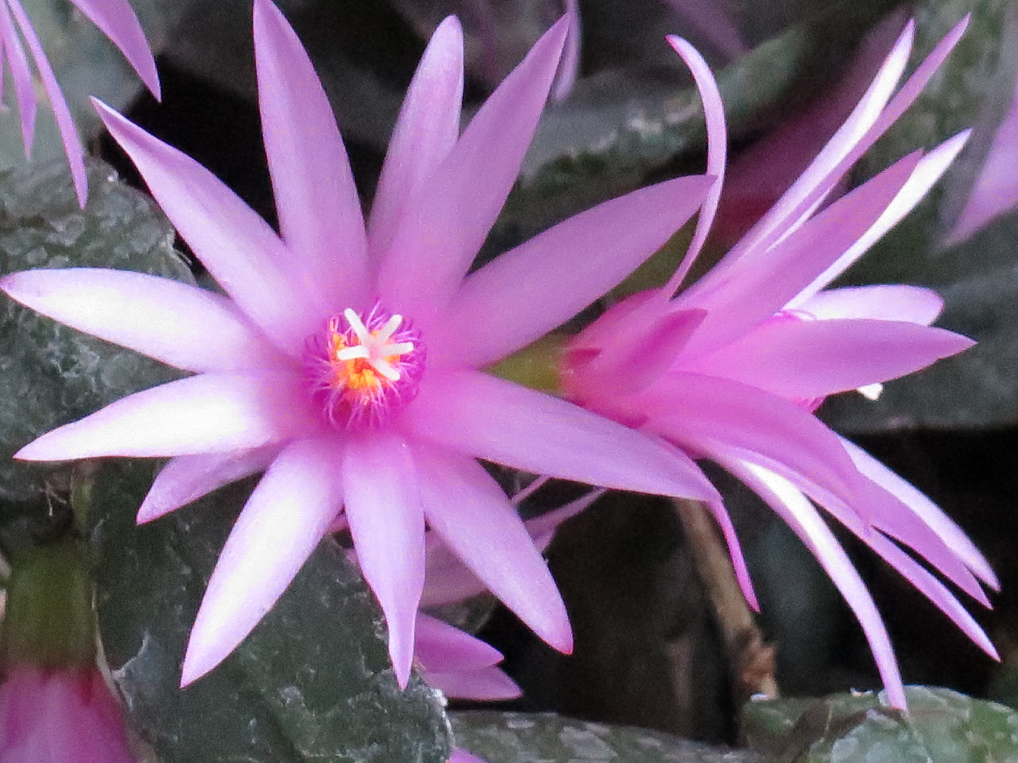 Fiori di hatiora rosea